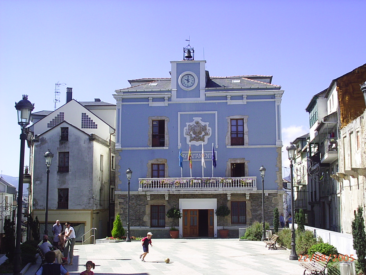 Ayuntamiento del concejo Asturiano de Navia